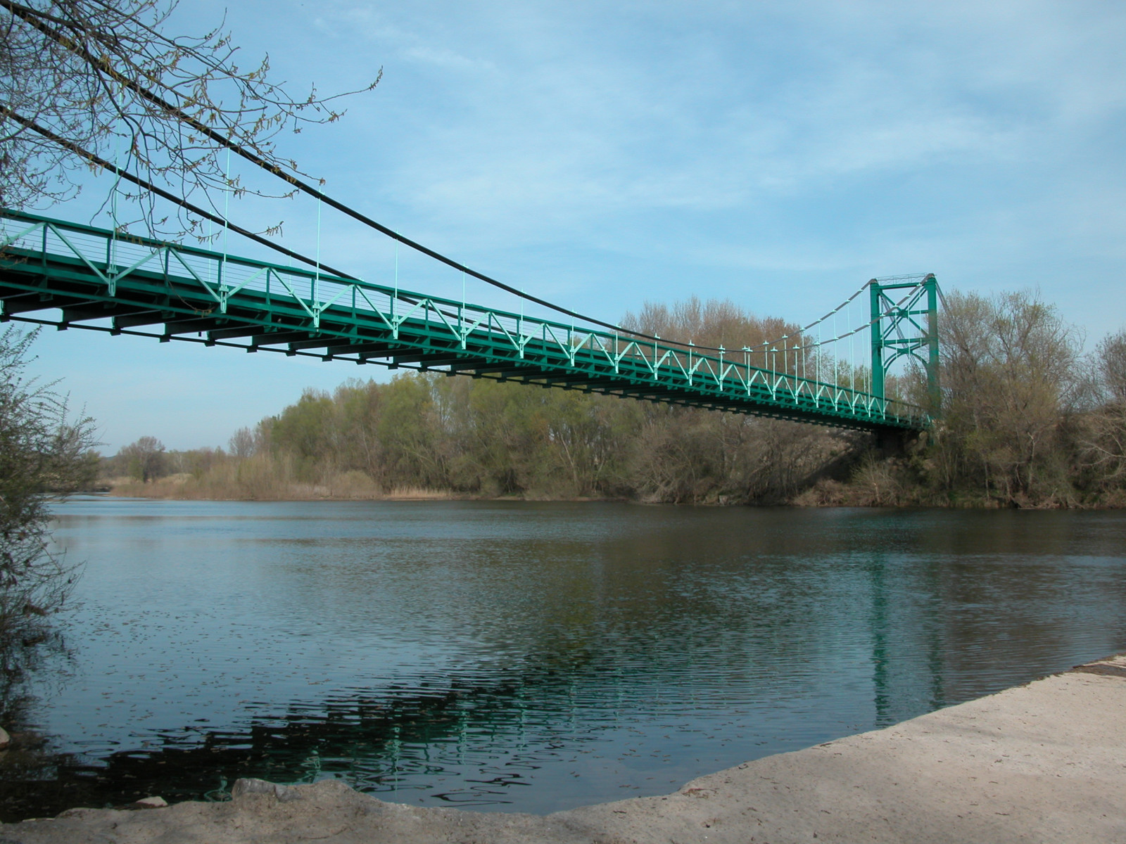 Pont de Cessenon-sur-Orb qui enjambe l'Orb.